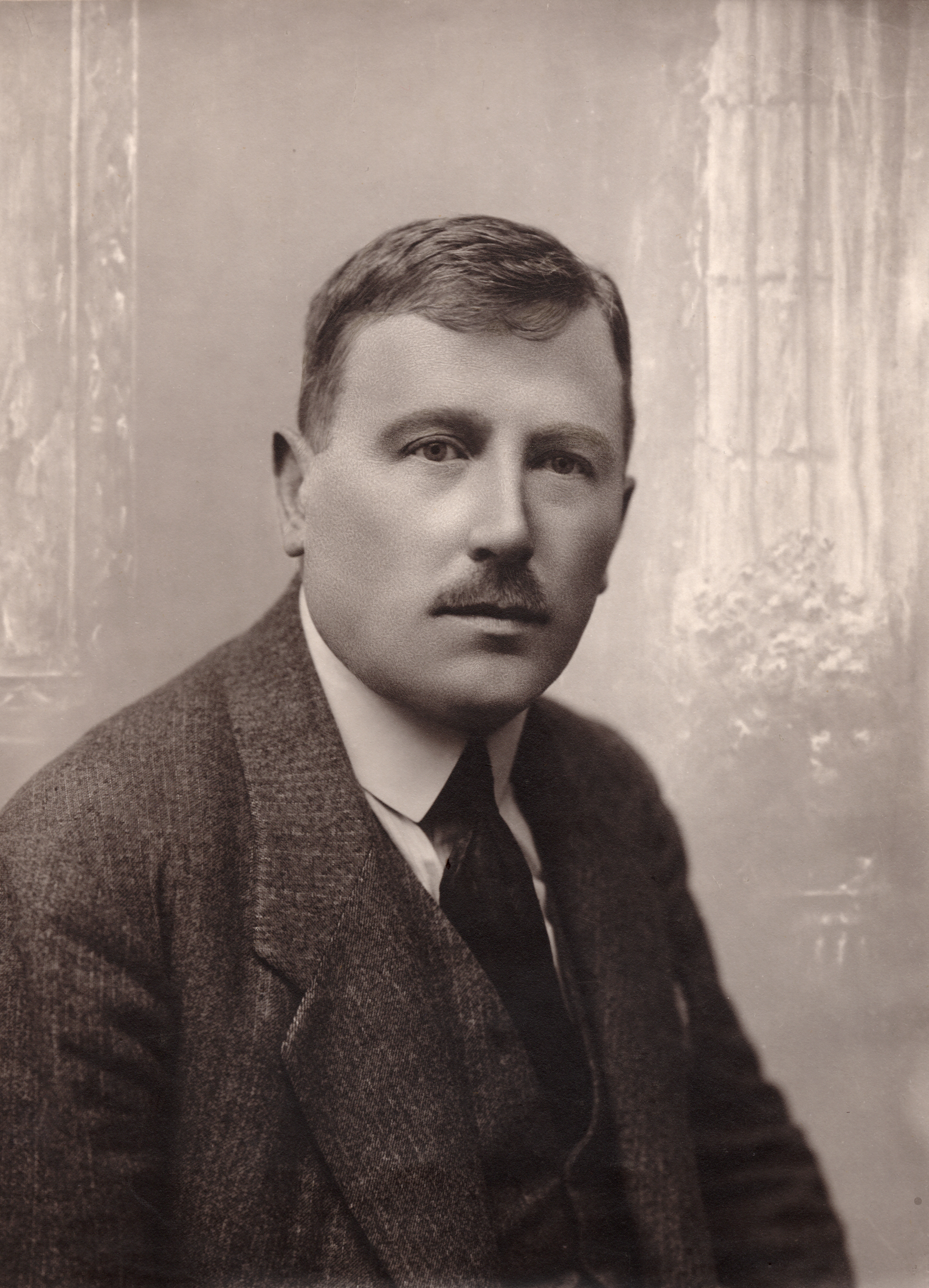 Tadeusz Zakrzewski